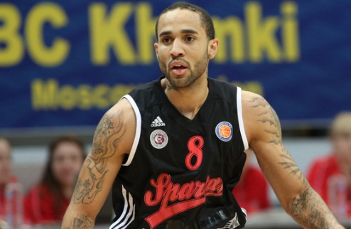 Khimki(Moscow)